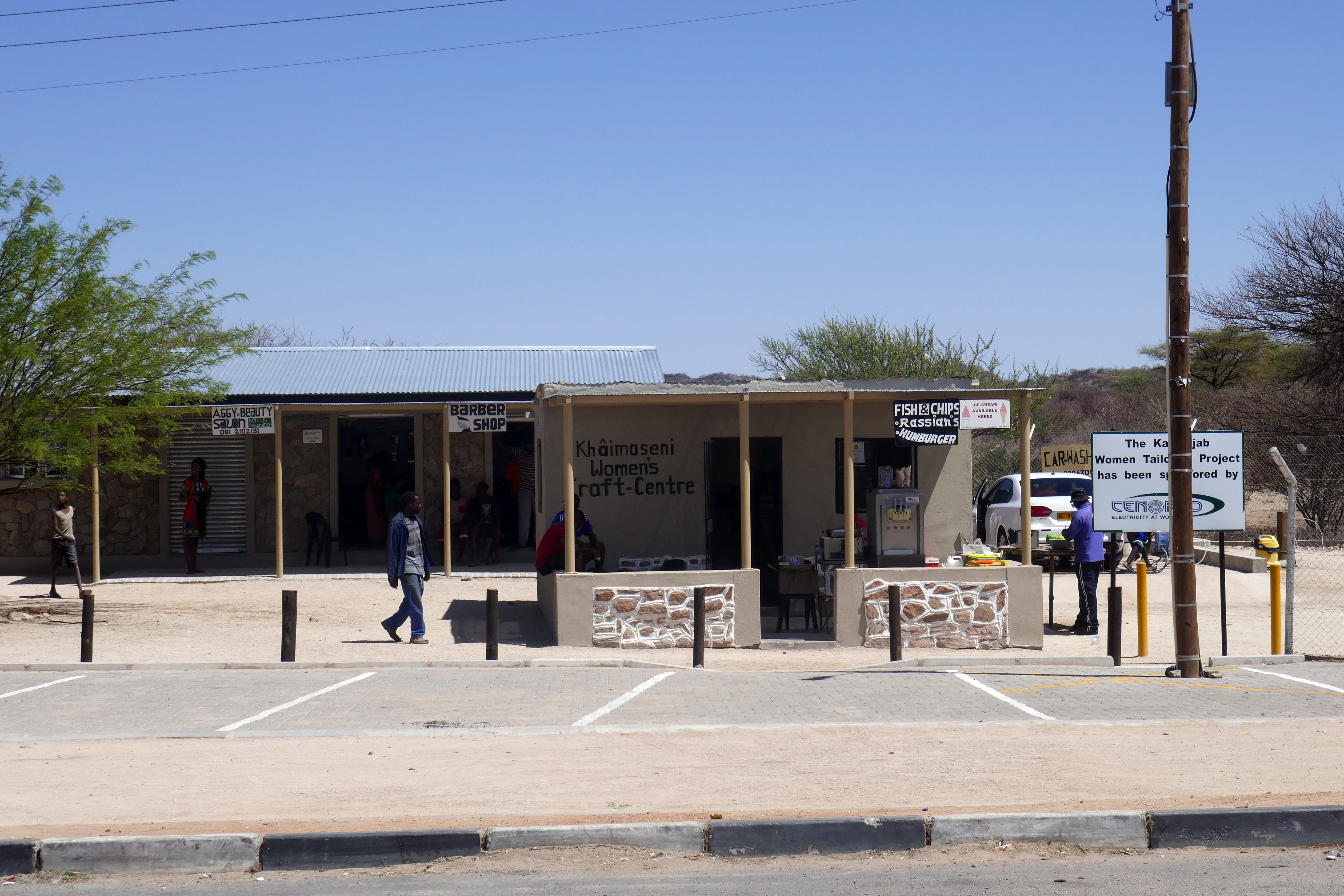 Kamanjab (Namibie).